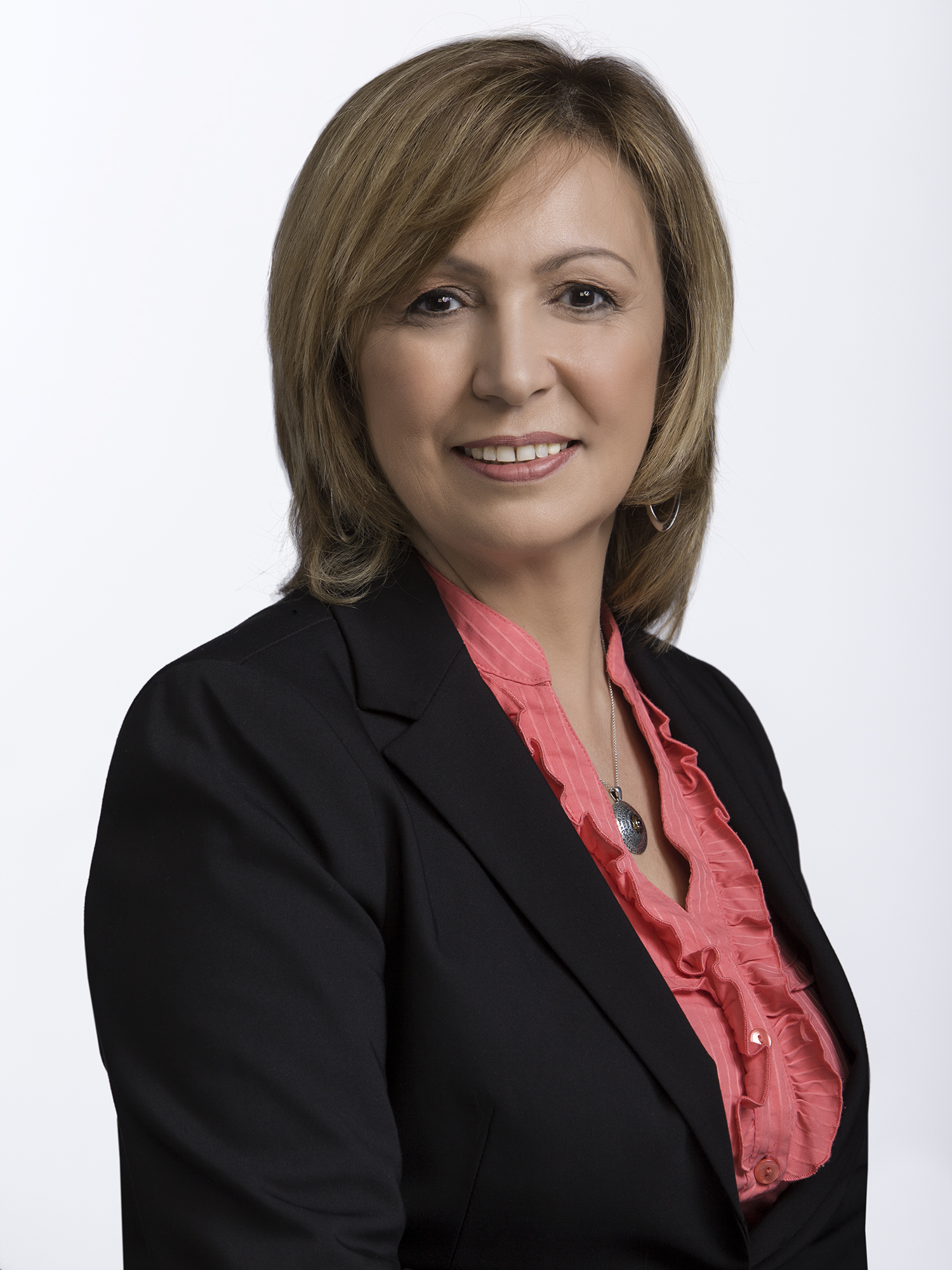 רינה פרנקל.